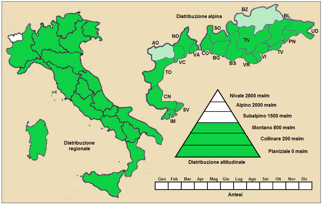 Forasacco maggiore (Bromus ramosus - Distribuzione italiana)